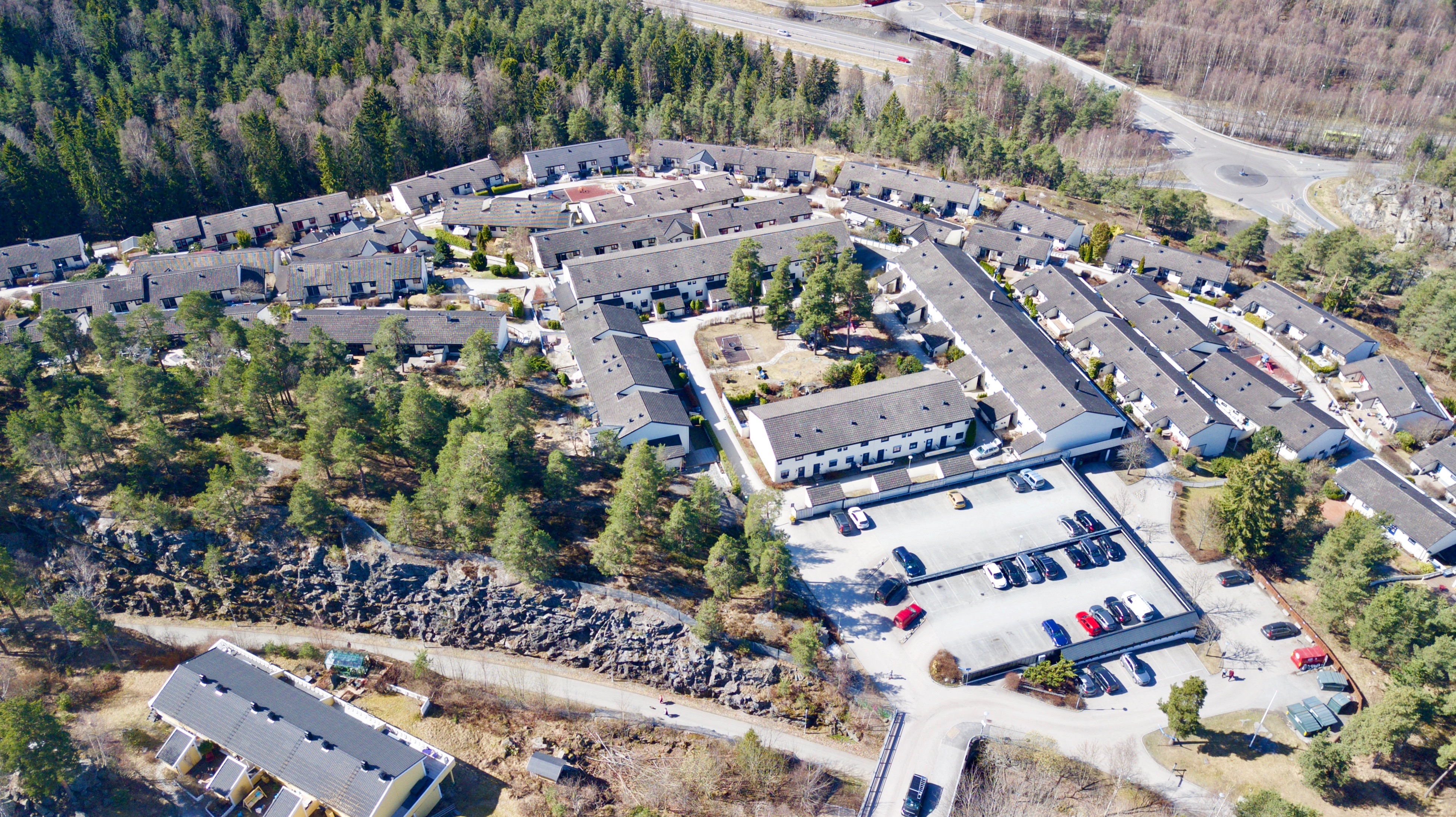 Gamlelinja. Holmlia i Oslo.